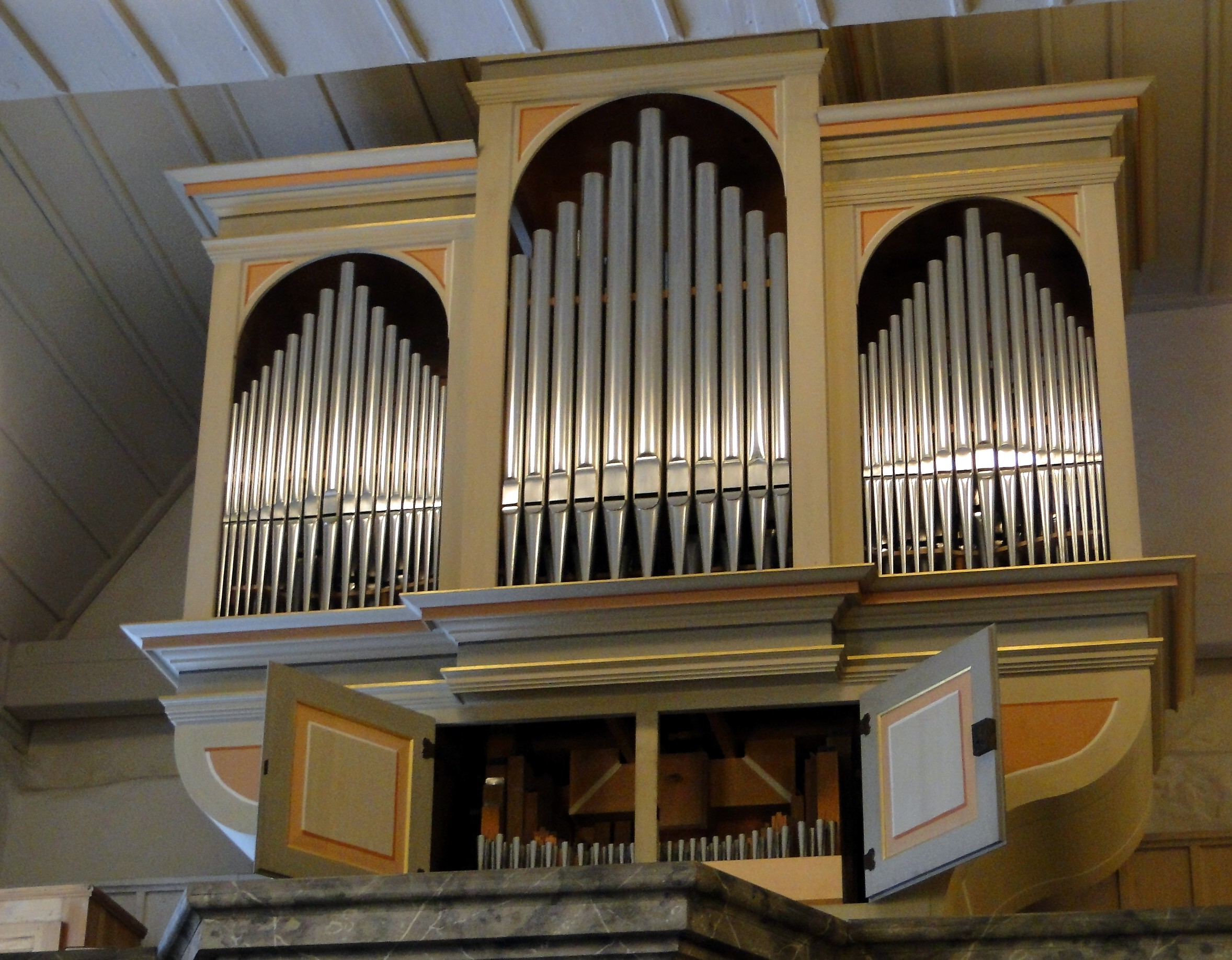 Christophoruskirche Dresden-Wilschdorf